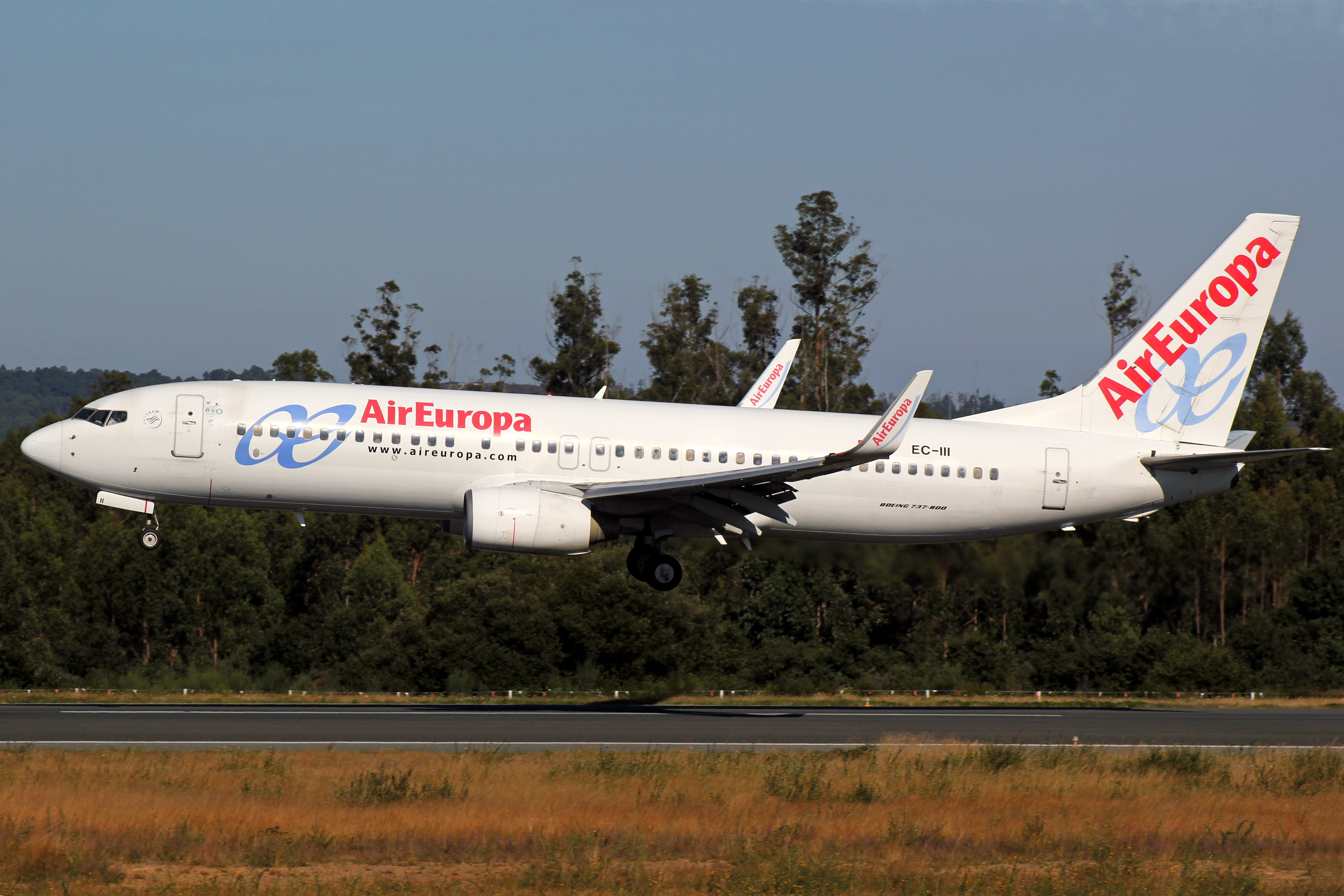 Boeing 737 de Air Europa aterrando no aeroporto de Santiago de Compostela.